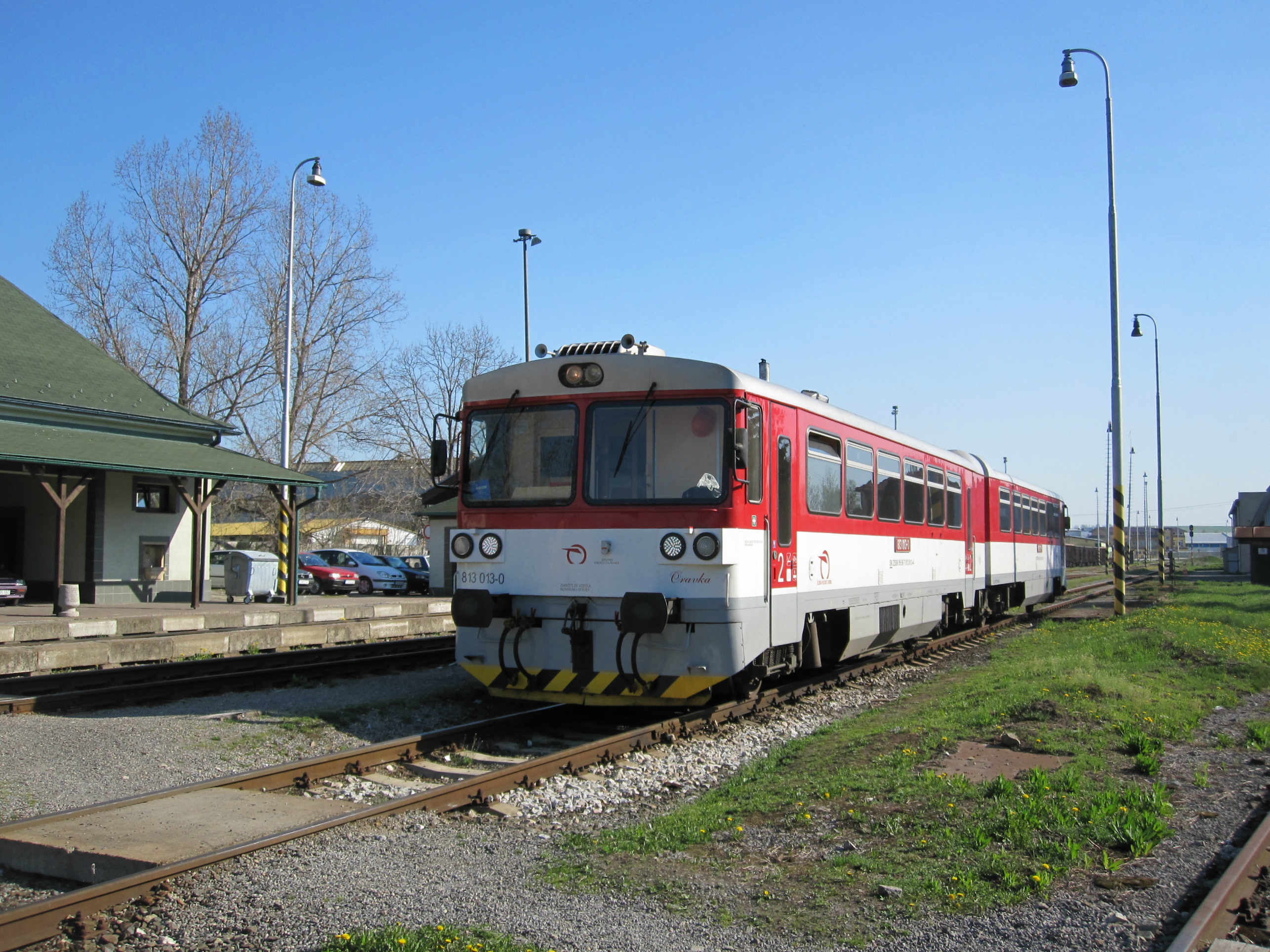 Motorová jednotka 813.013 Železniční společnosti Slovensko, Trstená